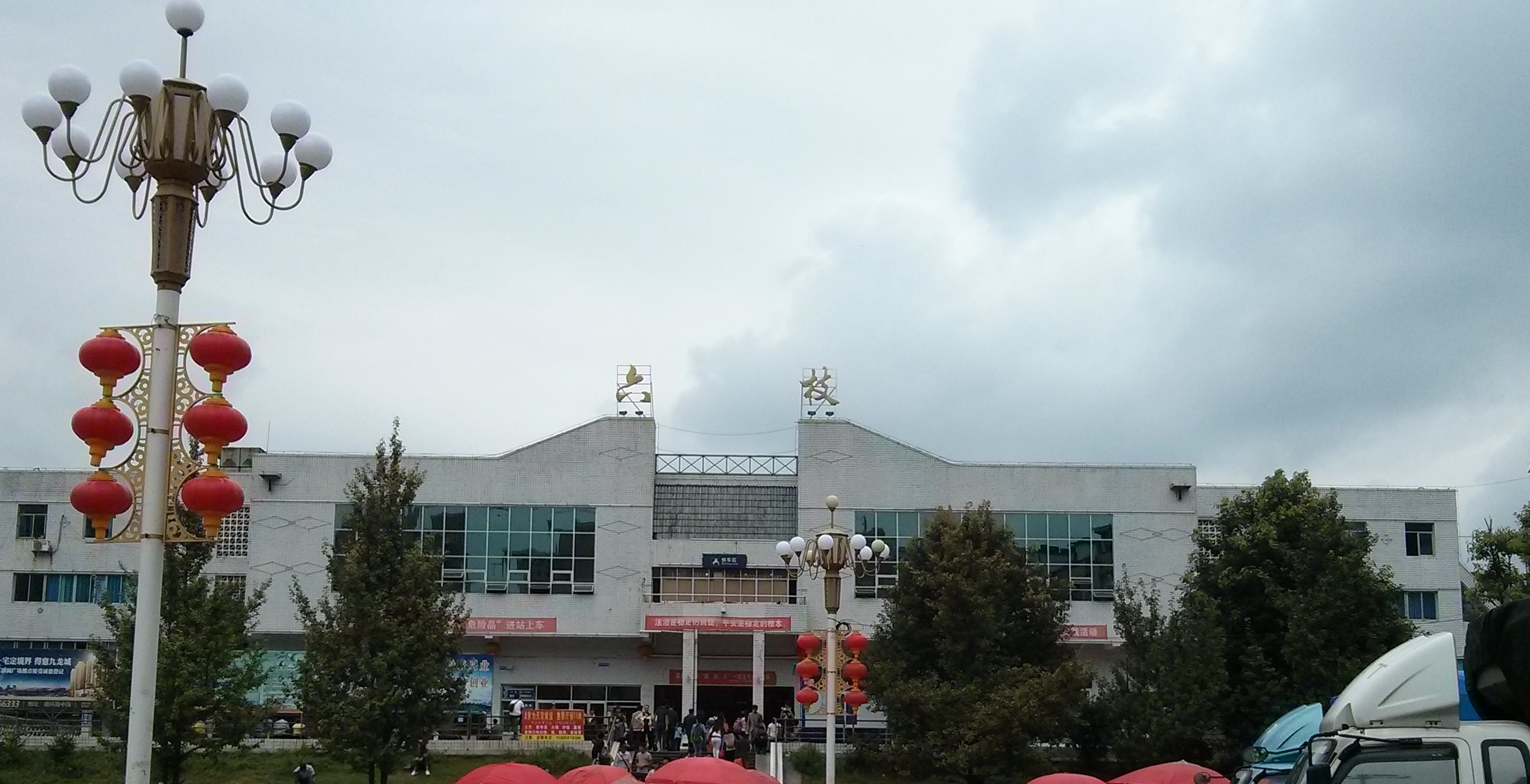 中文（中国大陆）: 贵州省六枝特区，六枝火车站